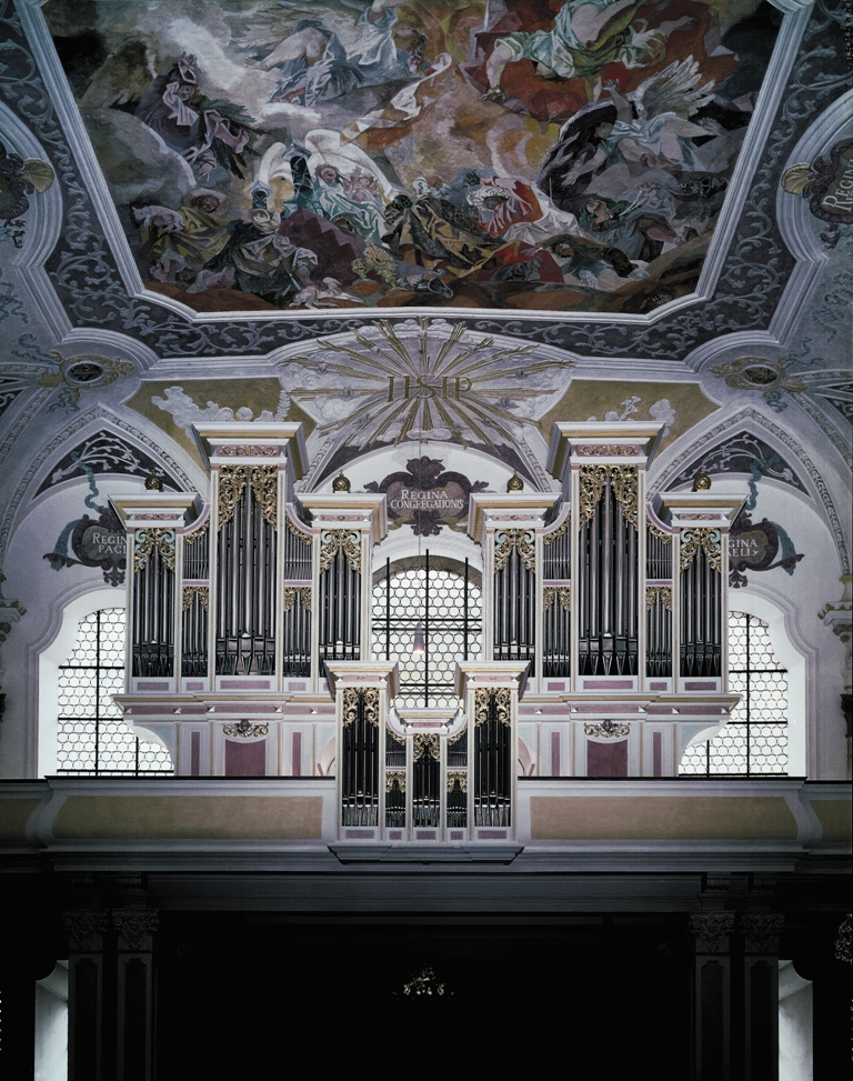 Ansicht der Vleugels-Orgel in der Bürgersaalkirche in München.